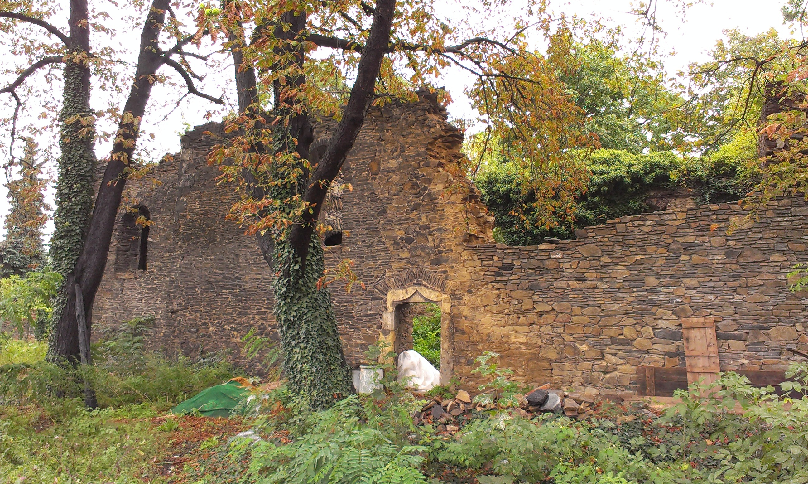 Zřícenina kostela Všech svatých v Kolíně